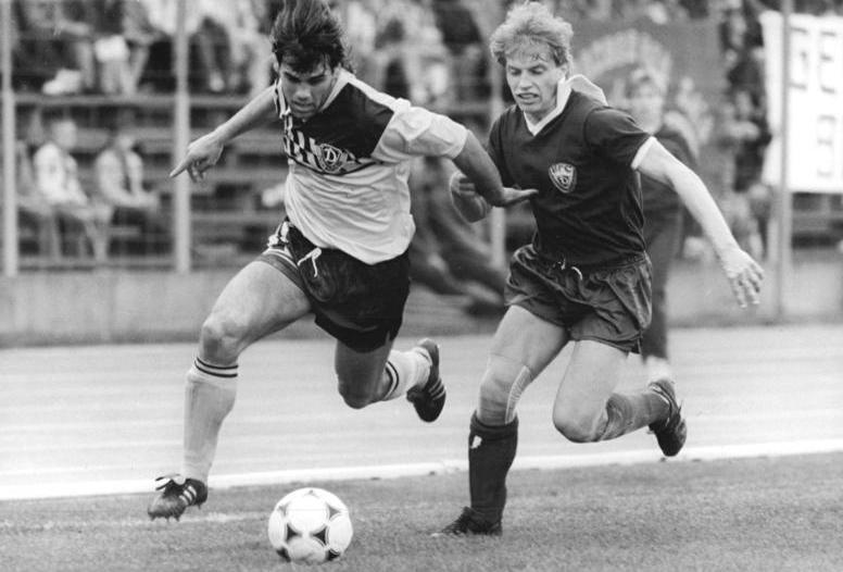 ADN-ZB-Oberst-5.3.89-We- Berlin: Fußball-Oberliga- In einem Nachholespiel trennten sich Titelverteidiger BFC Dynamo und Spitzenreiter Dynamo Dresden 1:1 (0:1), womit der Abstand zwischen beiden Vertretungen weiterhin sieben Punkte bringt. Hier ein Zweikampf zwischen Ulf Kirsten (l), der in der 31. Minute die Dresdner Führung erzielt hatte, und Jens-Uwe Zöphel (BFC).